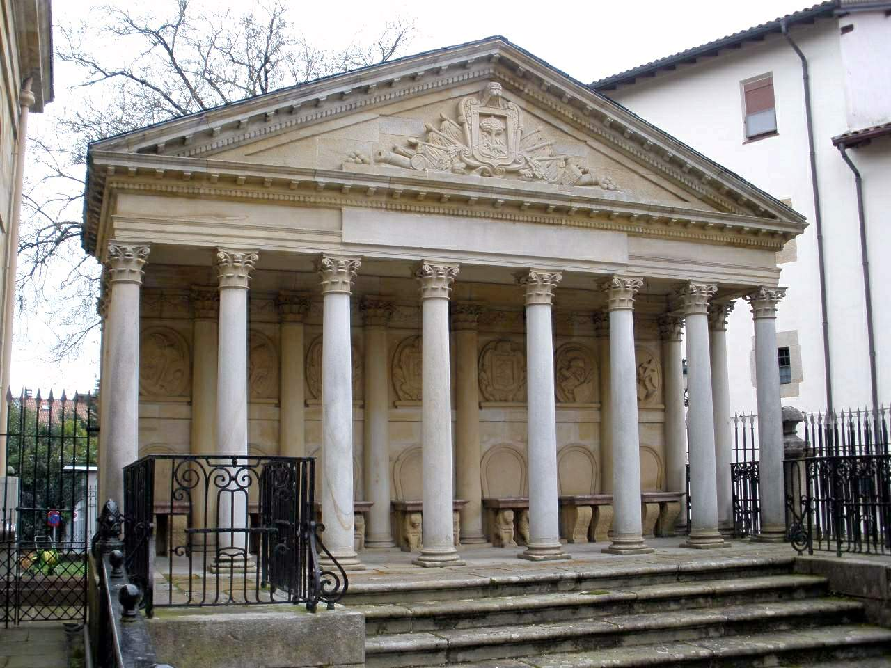 Casa de Juntas de Gernika (Vizcaya). Tribuna Juradera